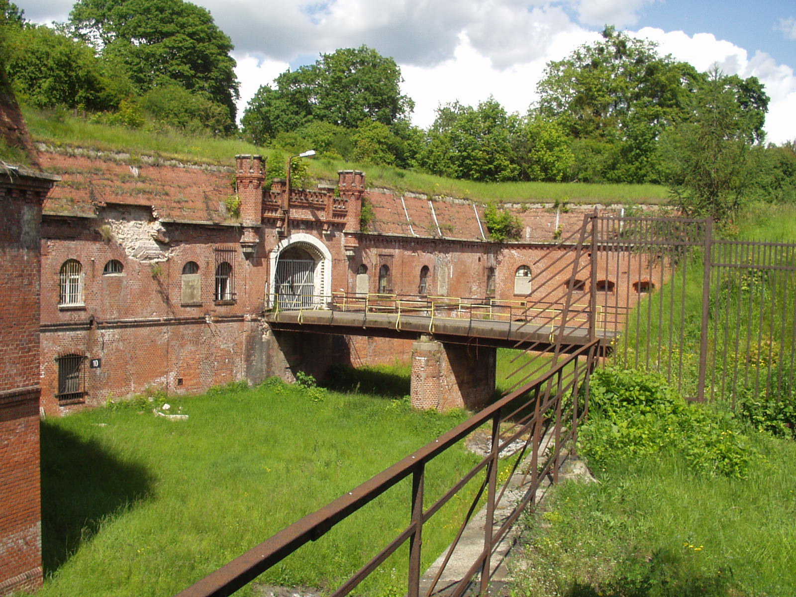 Brama wjazdowa do Fortu V Twierdzy Toruń